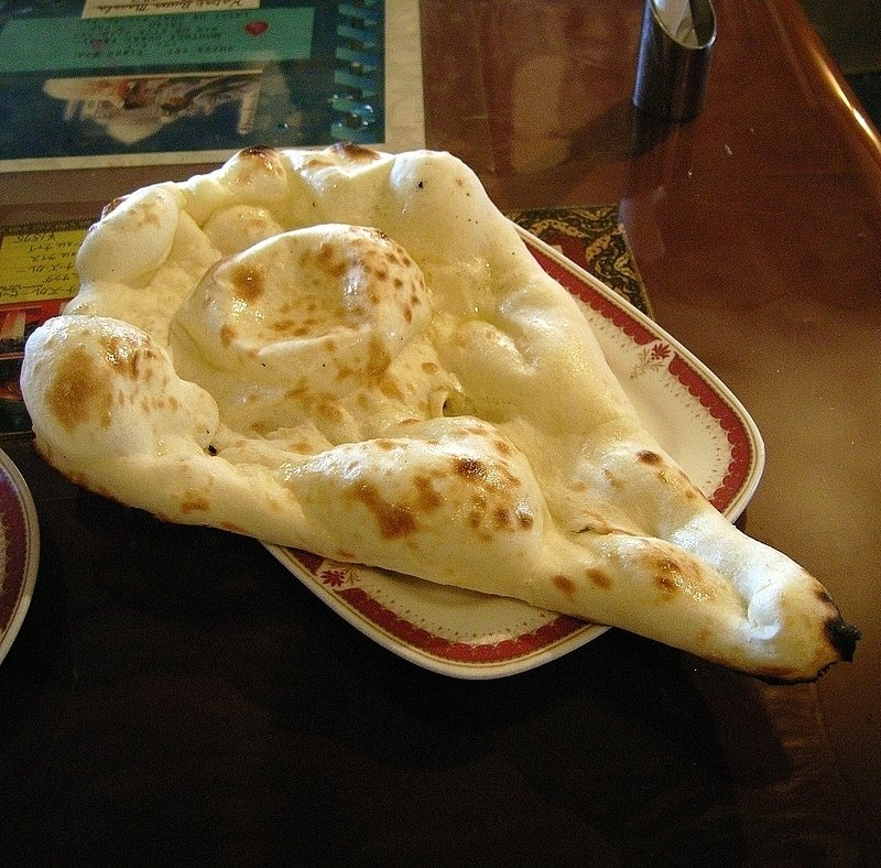 インド料理店「シヴァ」のナン